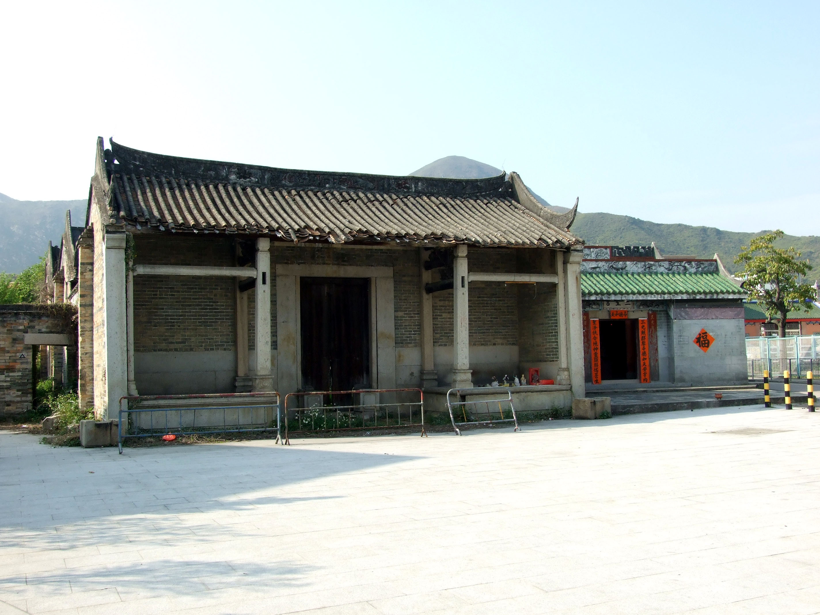 中文（香港）: 屯子圍陶氏宗祠與毗連的三聖宮